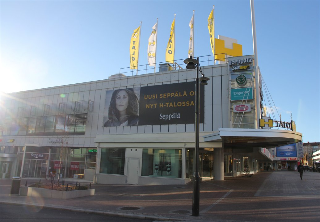 H-talon pääsisäänkäynti. H-talo oli Suomen ensimmäinen kauppakeskus. Se sijaitsee Kuopion torin lounaiskulmalla (Multimäen kaupunginosassa), osoitteessa Kauppakatu 32.